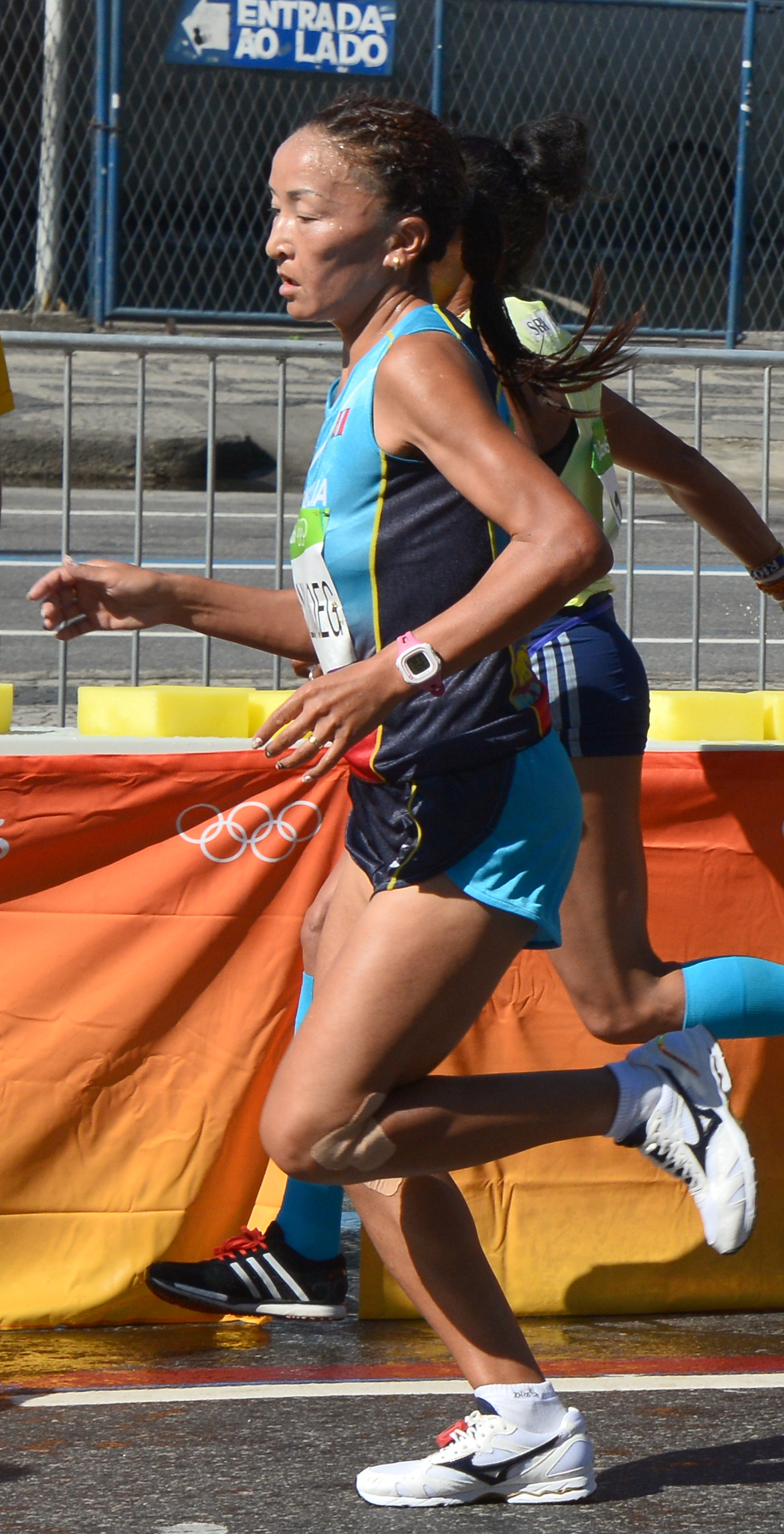 Passage du marathon des jeux olympiques de Rio 2016 dans le centre de Rio